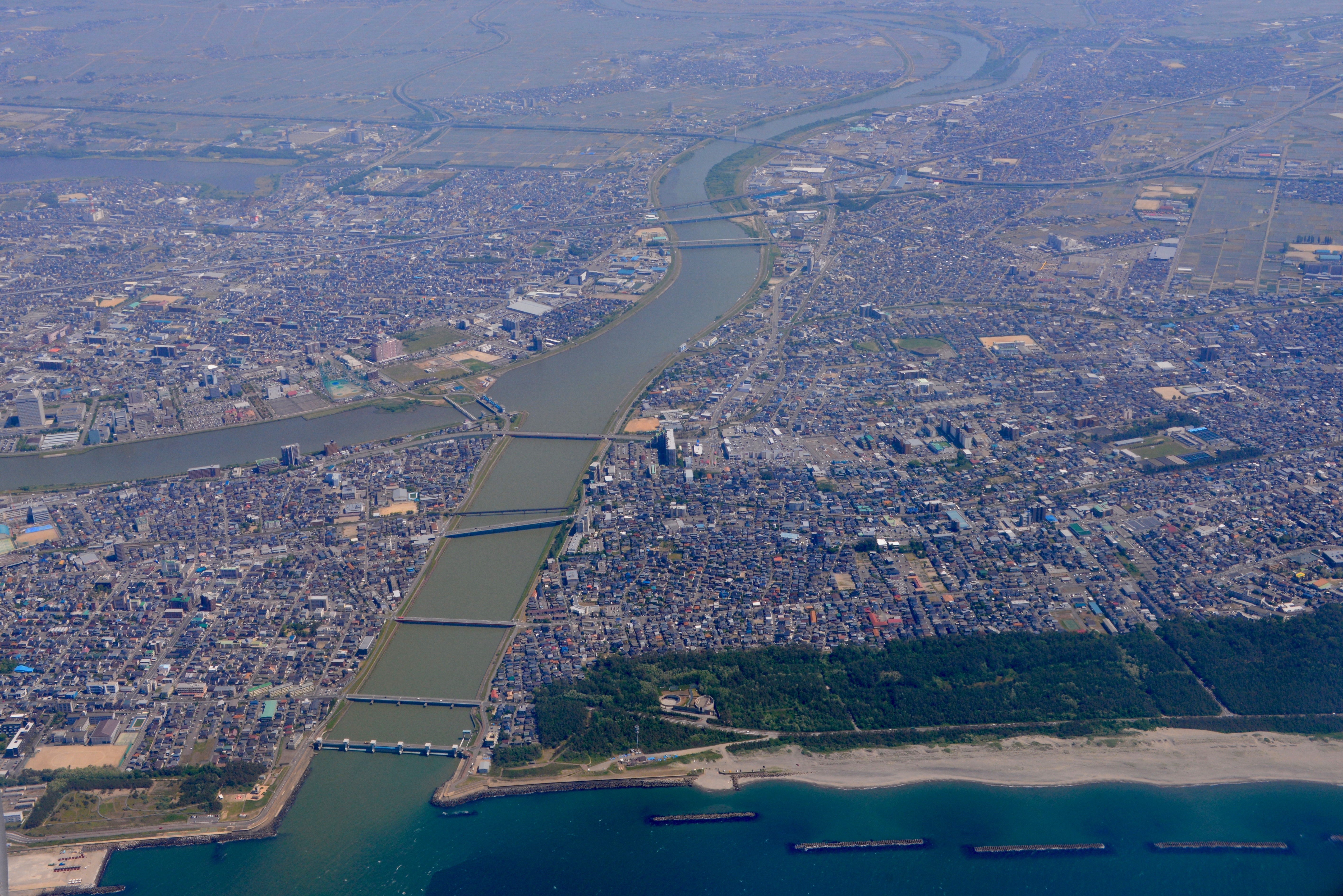 関屋分水路。新潟空港から離陸する機内より撮影